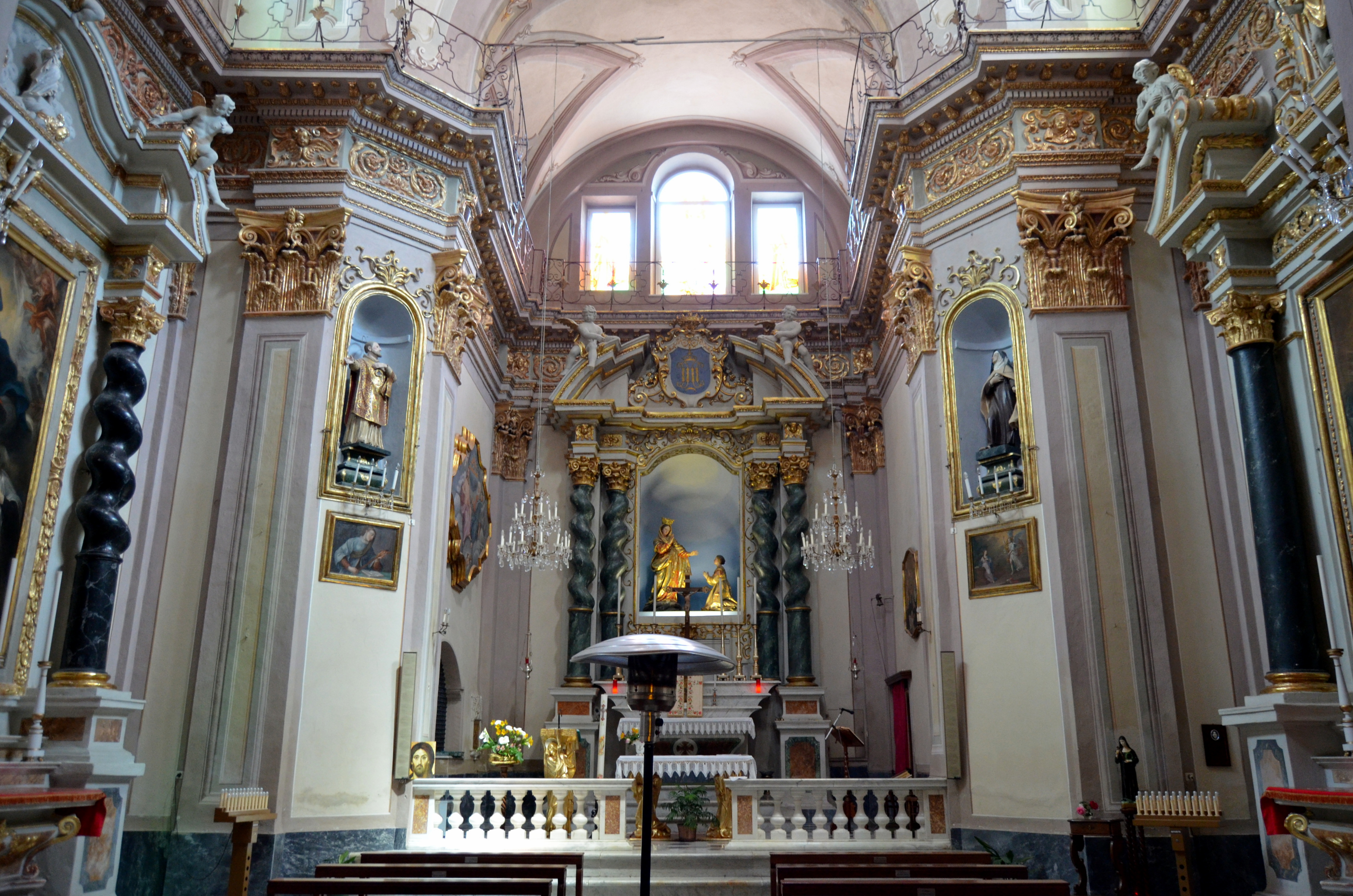 Tracce delle medievali mura di Levanto, Liguria, Italia La navata centrale della chiesa dei Santi Filippo Neri e Teresa d'Avila, Varese Ligure, Liguria, Italia